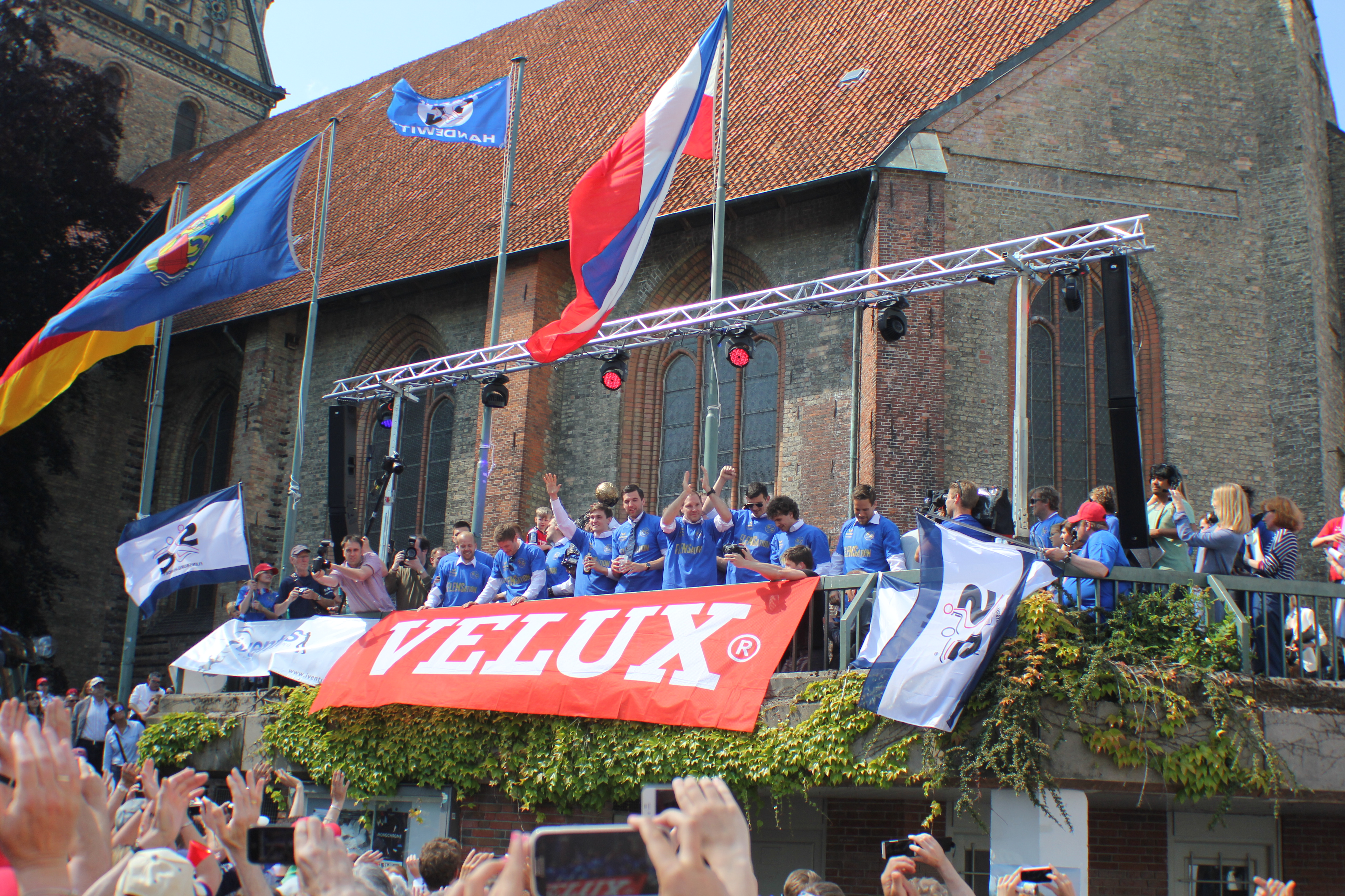 Jubelnde SG (Champions-League-Sieg, SG-Sigesfeier auf Südermarkt), Bild 008